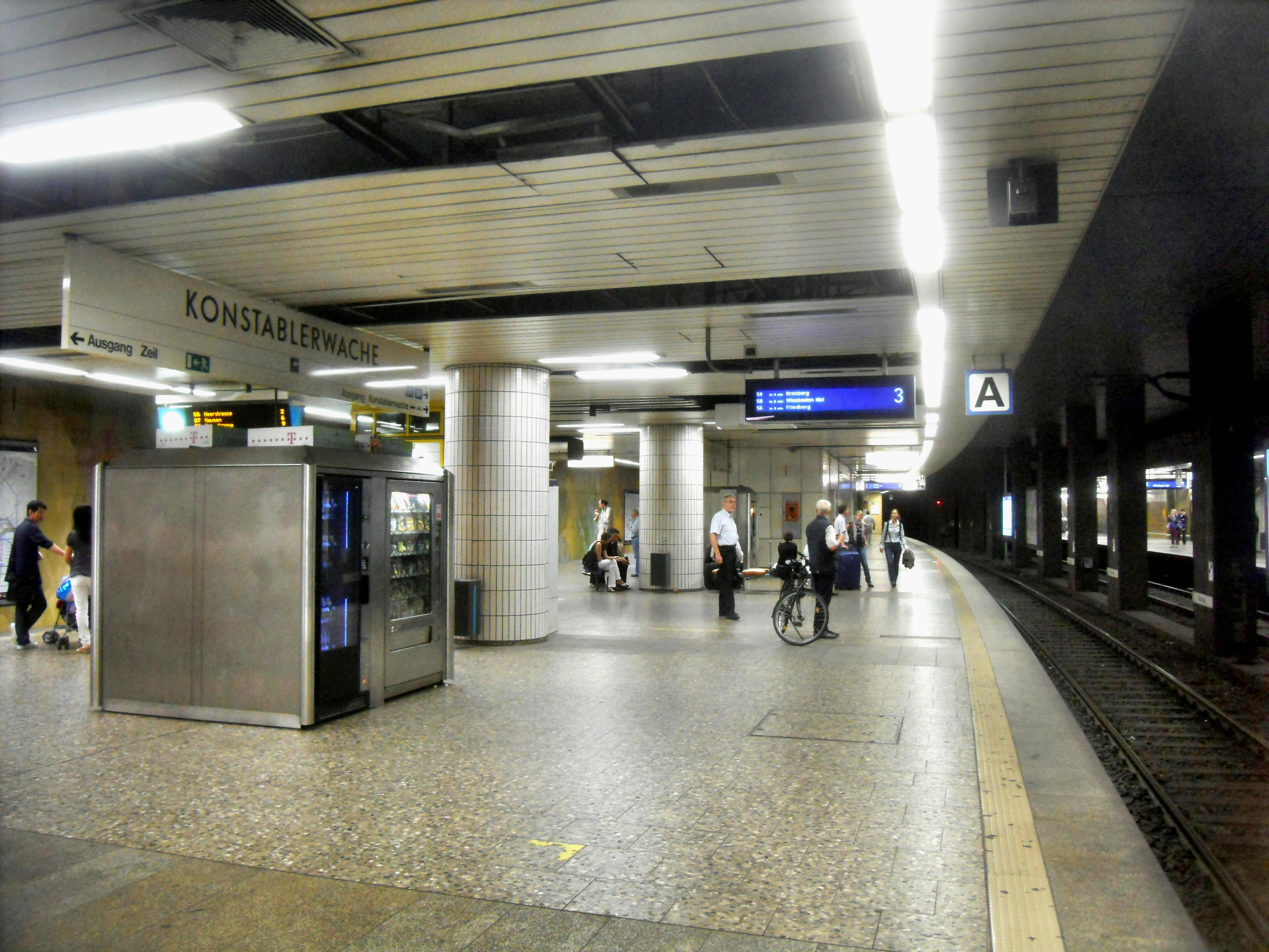 D-Ebene des Bahnhofs Frankfurt (Main) Konstablerwache im Rhein-Main-Gebiet in Deutschland